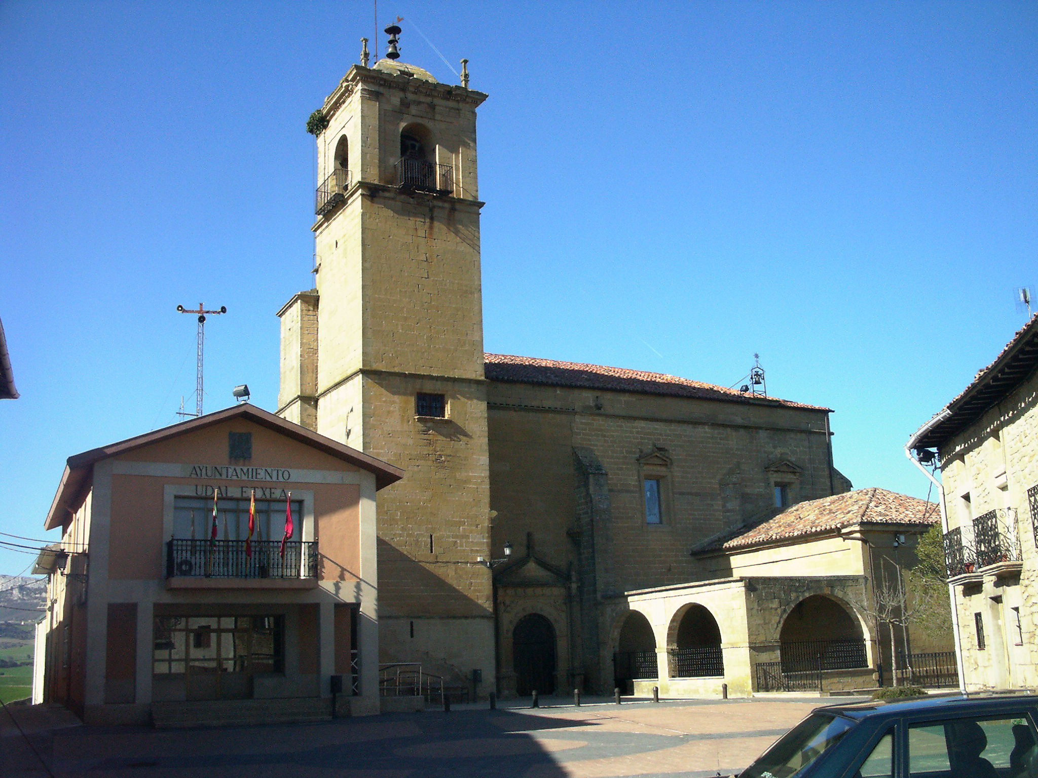 Ekorako udaletxea eta eliza.